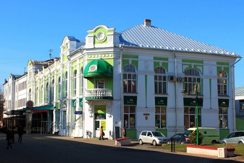 Будынак крэдытнага таварыства